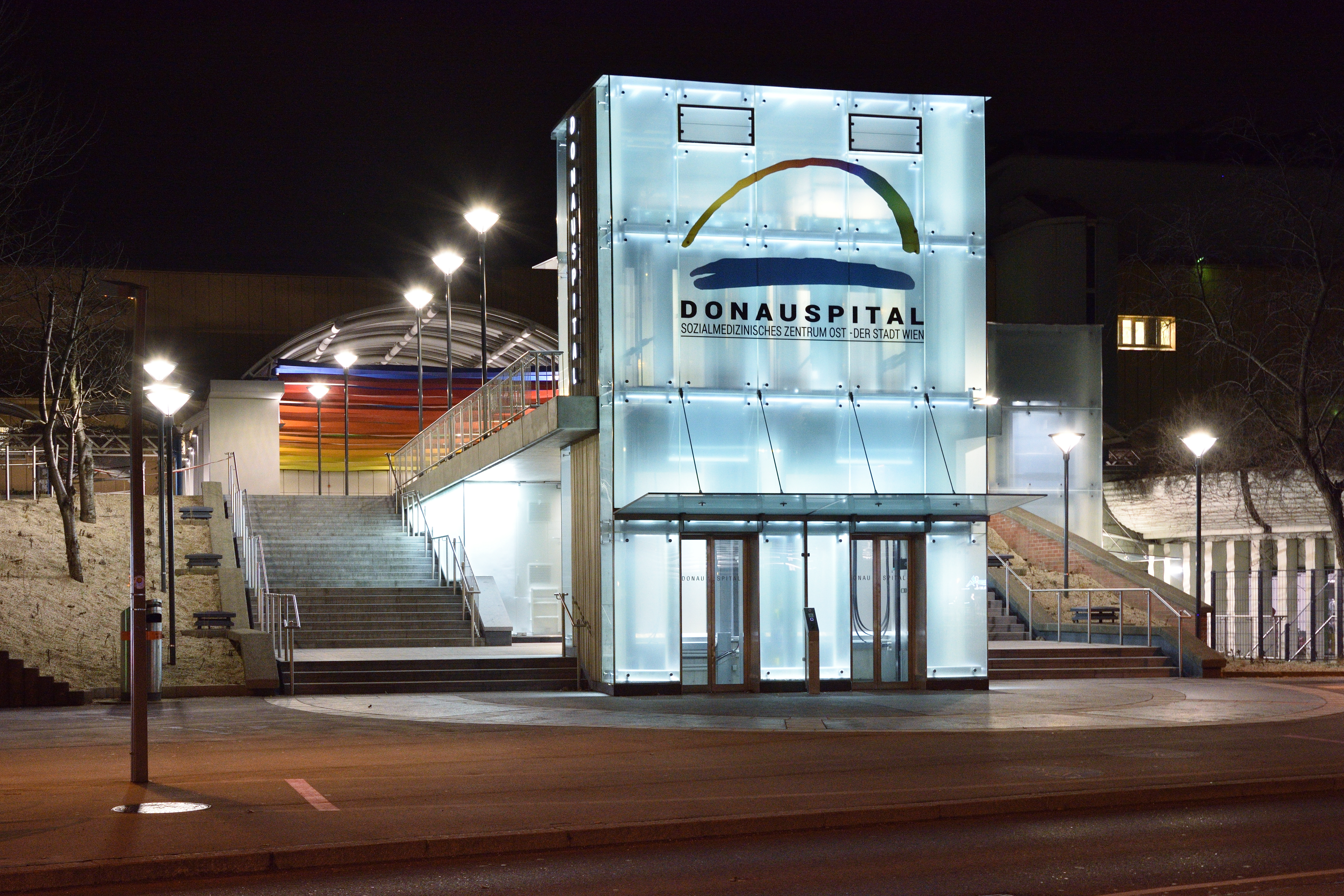 Neugestalteter Zugang zum Haupteingang des Donauspitals (SMZ Ost) in der Langobardenstraße